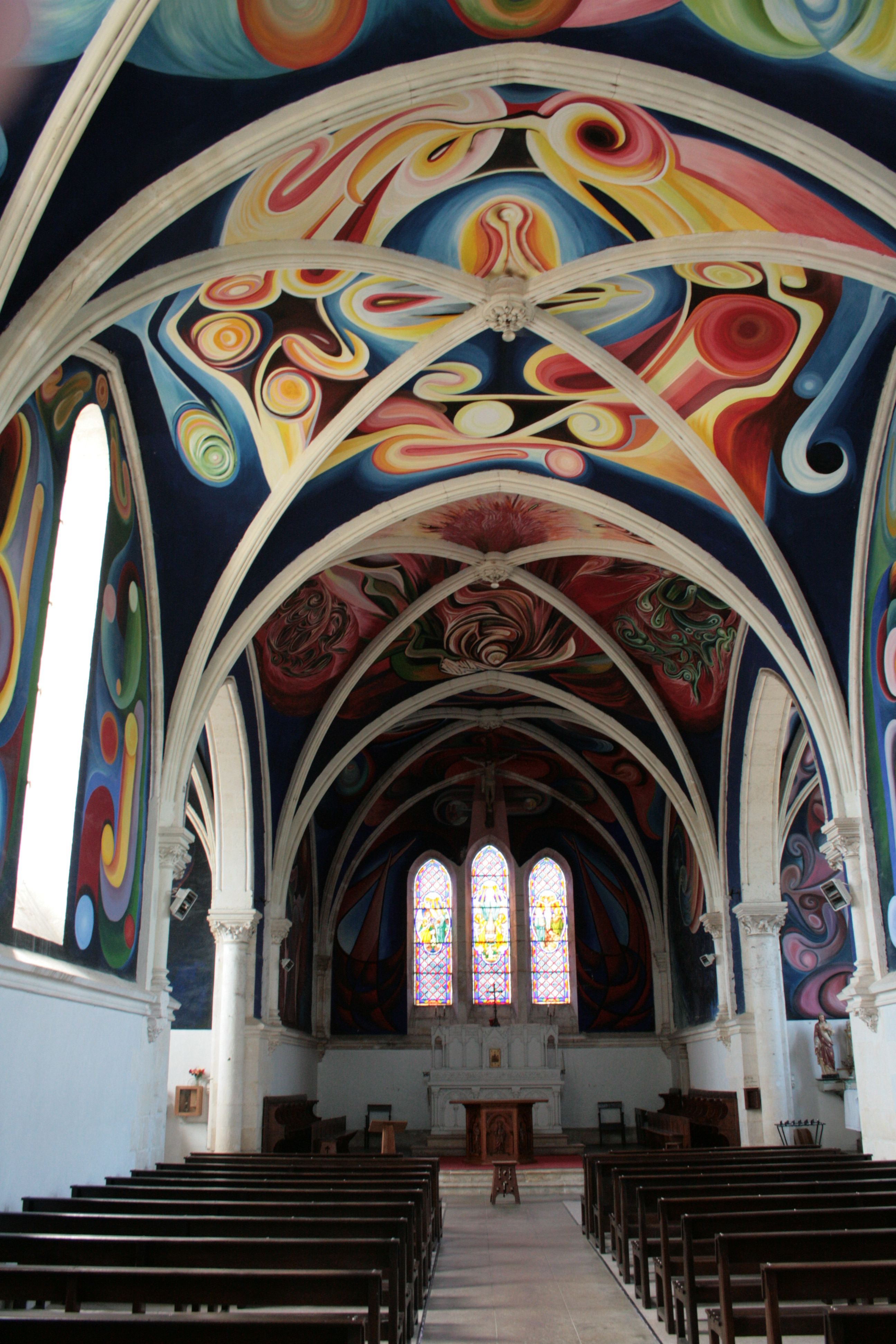 Le Menoux, Indre, France. Fresques de l'église - 1968-1976 - par Jorge Carrasco (1919-2006), peintre bolivien actif et mort en France. Vue générale vers le choeur.